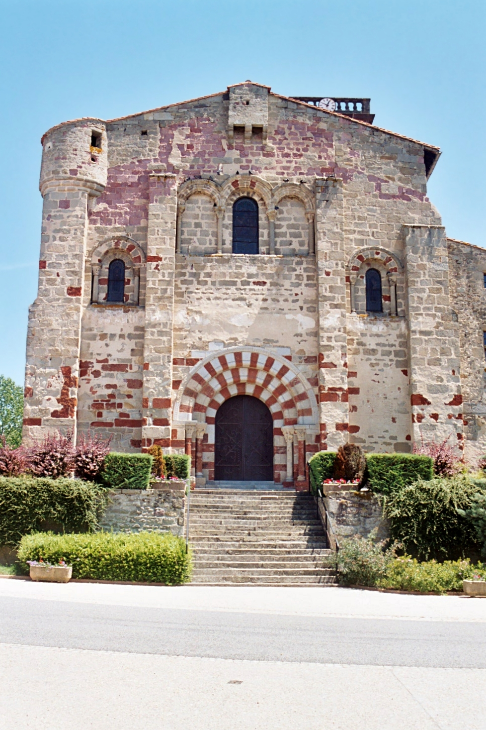 France - Auvergne - Église Saint-Didier de Saint-Dier-d'Auvergne